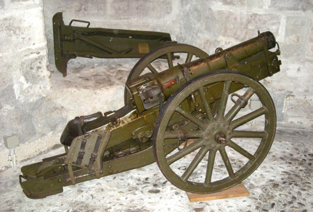 7,5 cm Geb Kan 1906